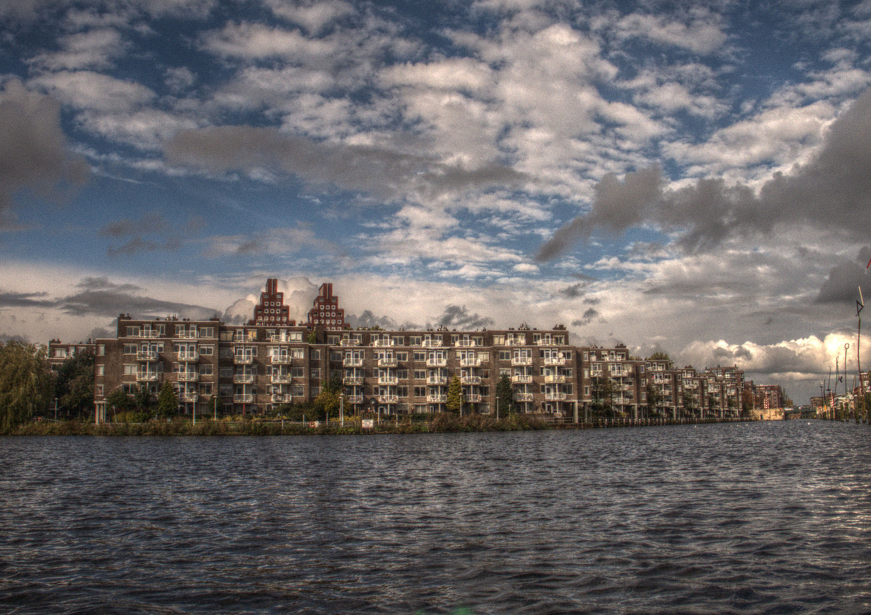 De wijk Kop van Jut in Amsterdam, gezien vanaf de Kostverlorenvaart oktober 2012